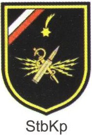 Panzerstabskompanie